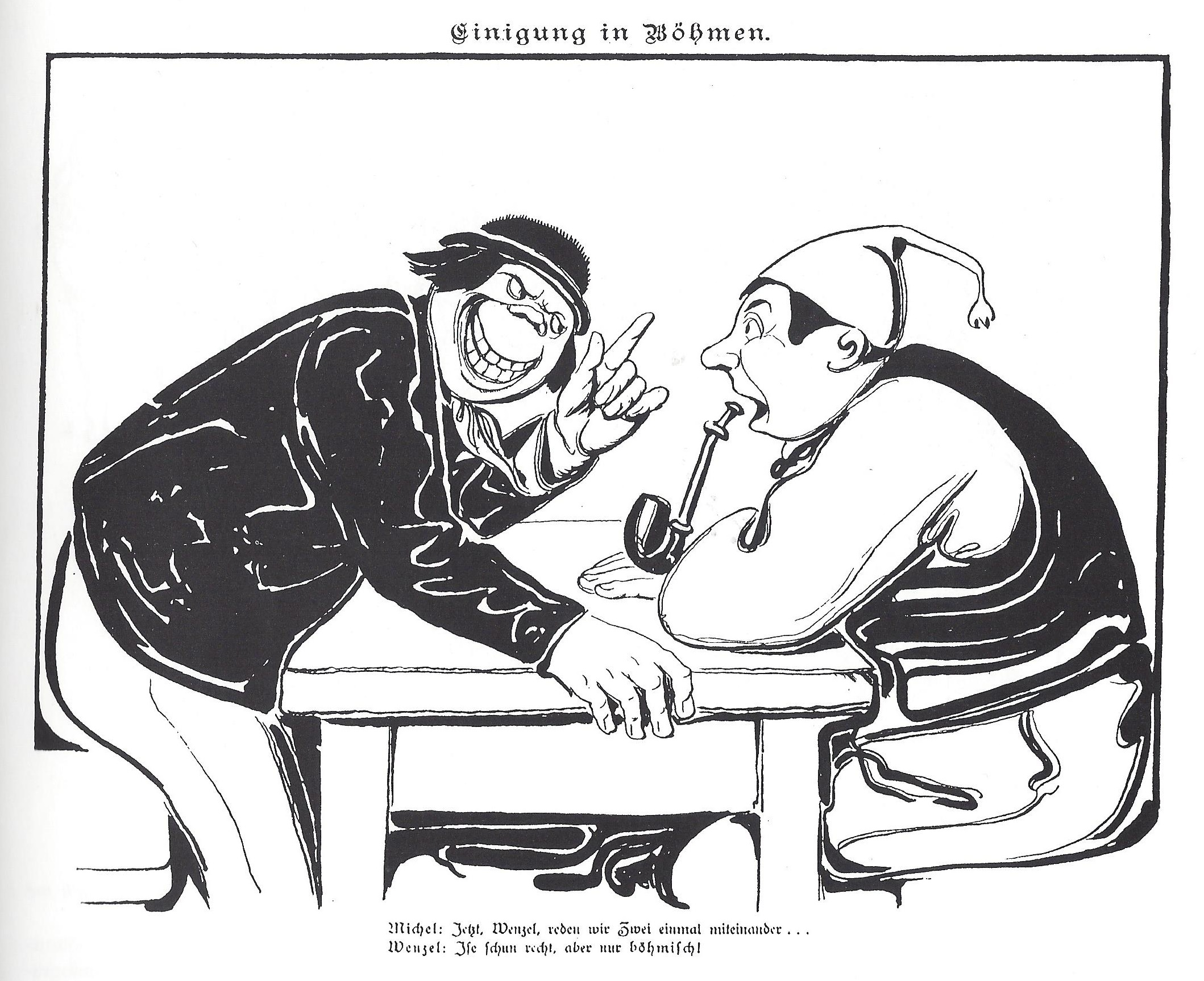 Karikatur des böhmischen Wenzels und des deutschen Michels. Michel (rechts): Jetzt, Wenzel, reden wir Zwei einmal miteinander ... Wenzel (links): Ise schun [Ist schon] recht, aber nur böhmisch! „Böhmisch“ heißt hier durchtrieben, listig, verschlagen.